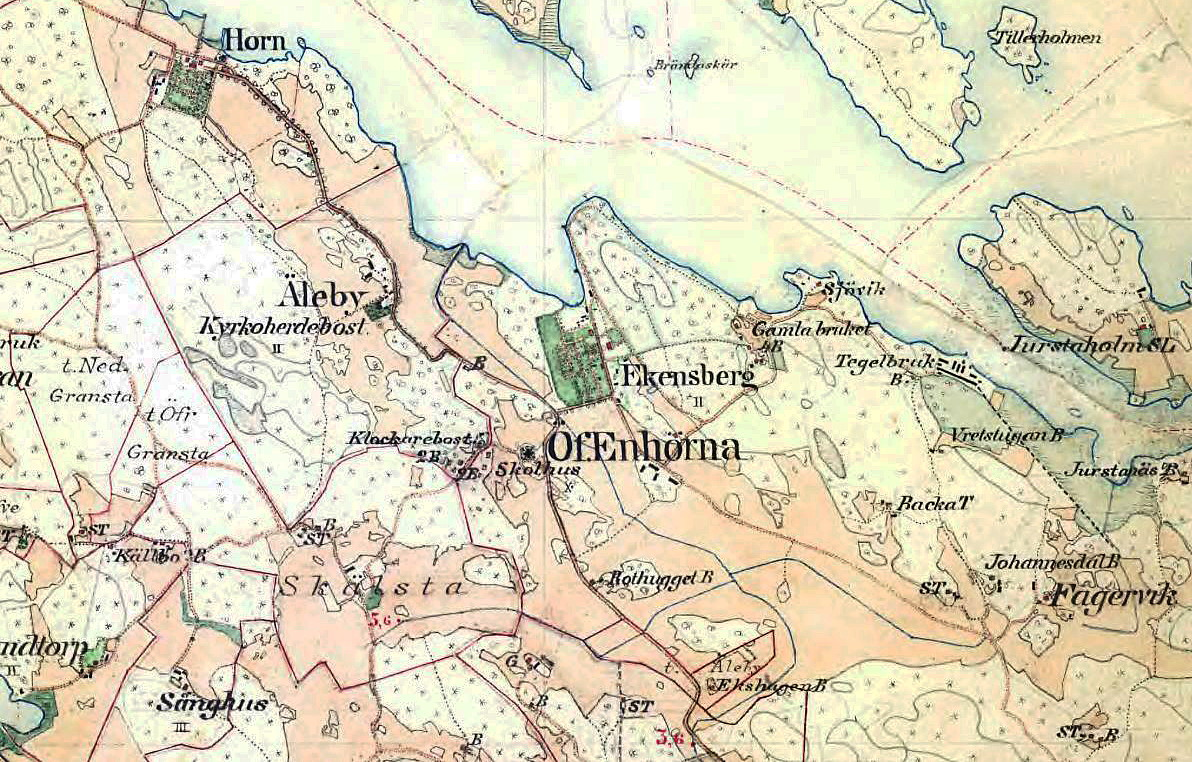 Horns och Ekensbergs herrgårdar på Häradsekonomiska kartan